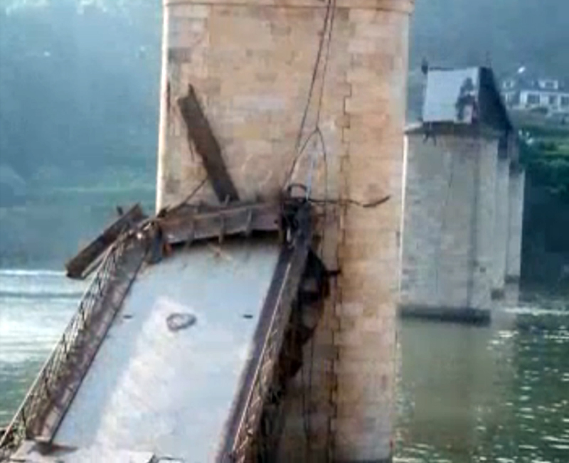 Puente Hintze Ribeiro colapsado